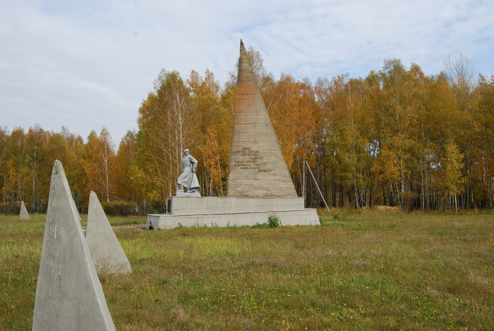 Стела на мемориальном комплексе Кривцово Болховского района Орловской области